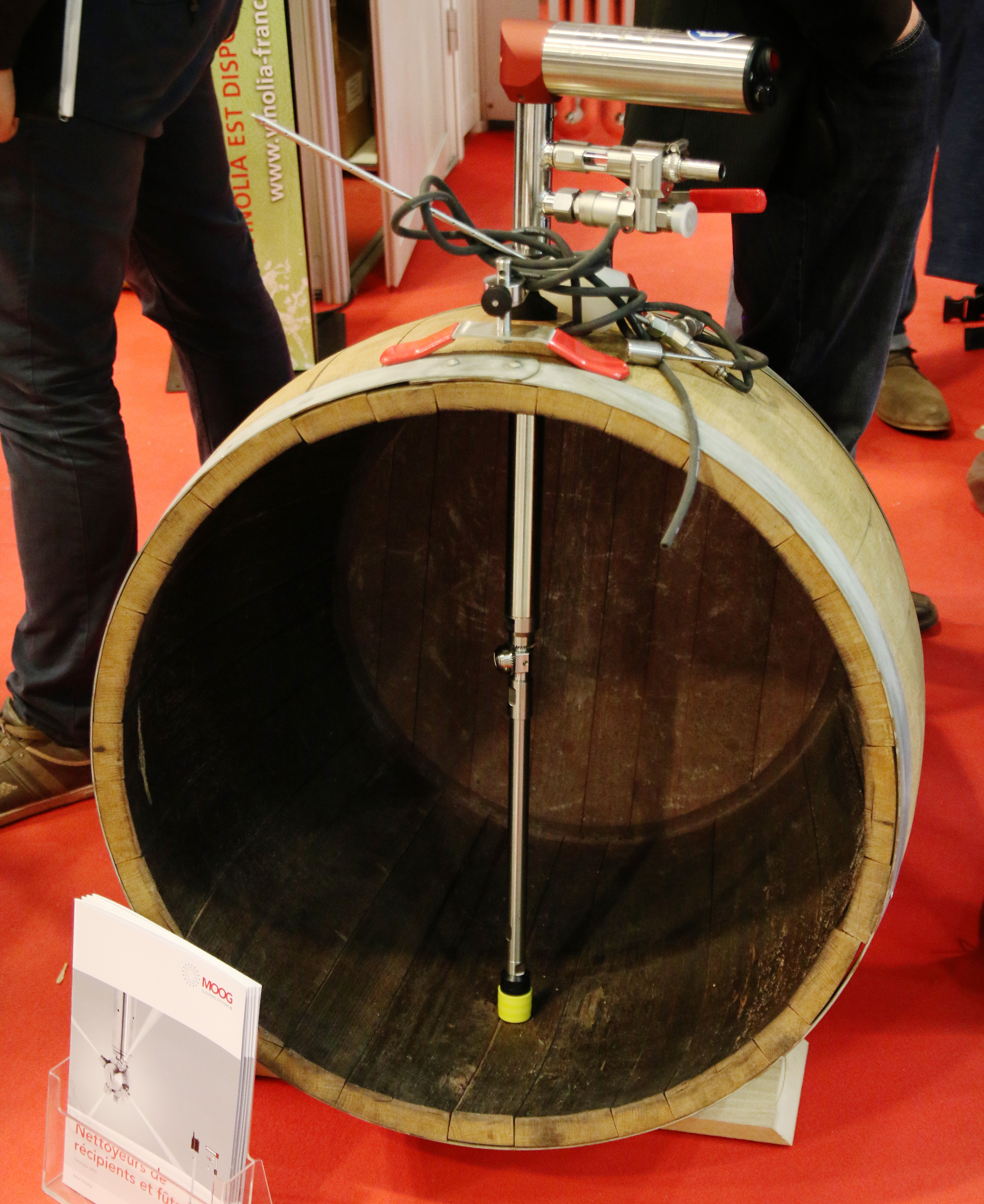 Canne de nettoyage d'un fût (coupe)